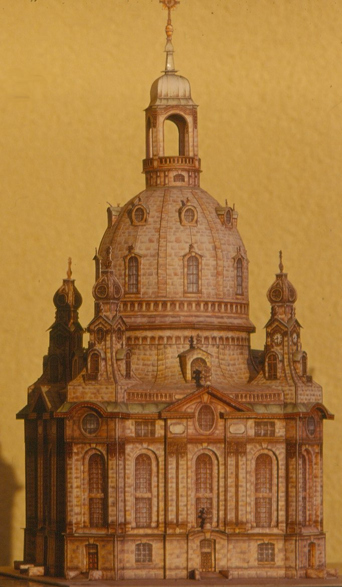 Schreiber-Kartonmodell der Frauenkirche Dresden